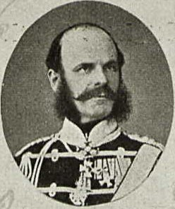 General der Kavallerie Gustav Waldemar von Rauch. Quelle: von Eck, Geschichte des 2. Westfäl. Husaren-Regiments No. 11 und seiner Stammtruppen von 1807-1903, Düsseldorf 1904